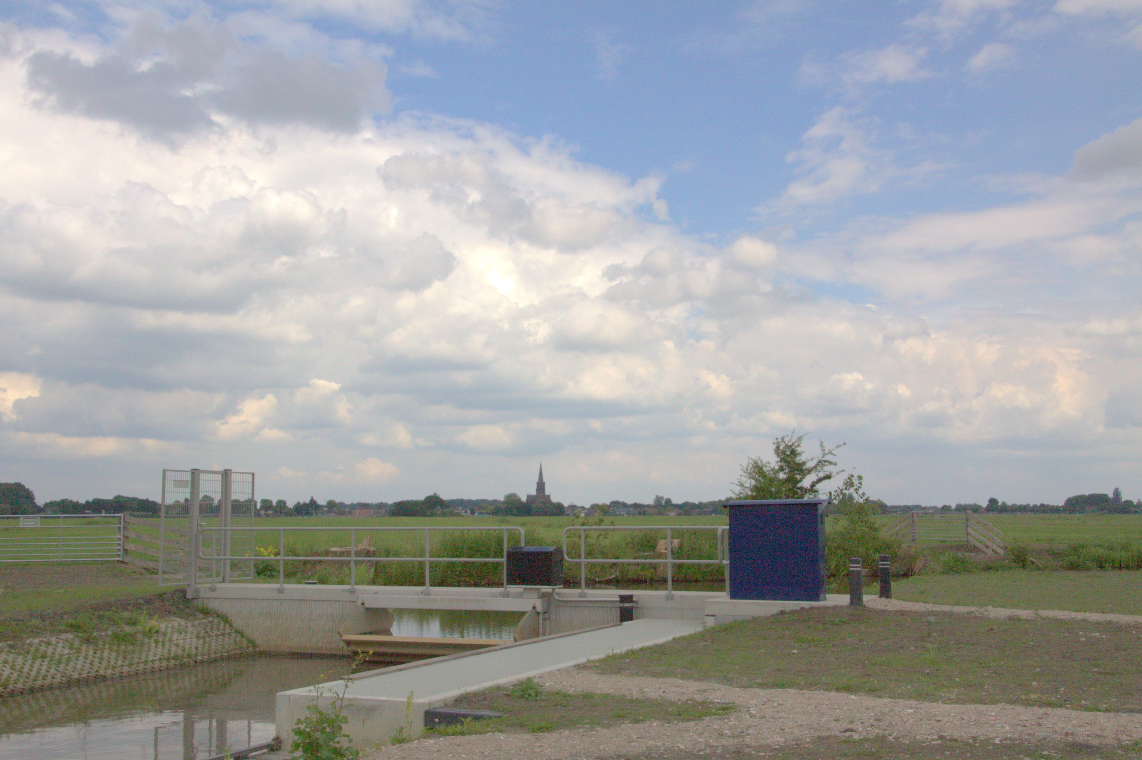 In de verte zien we Schalkwijk over het nieuwe waterbergingsgebied.